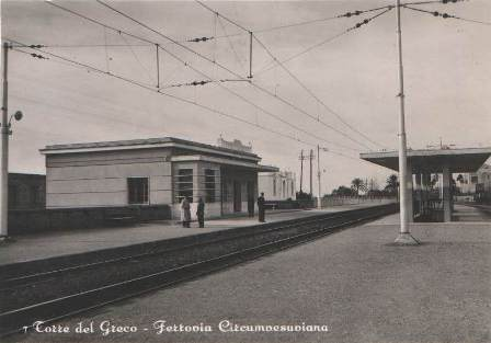 Stazione di Leopardi, Torre del Greco